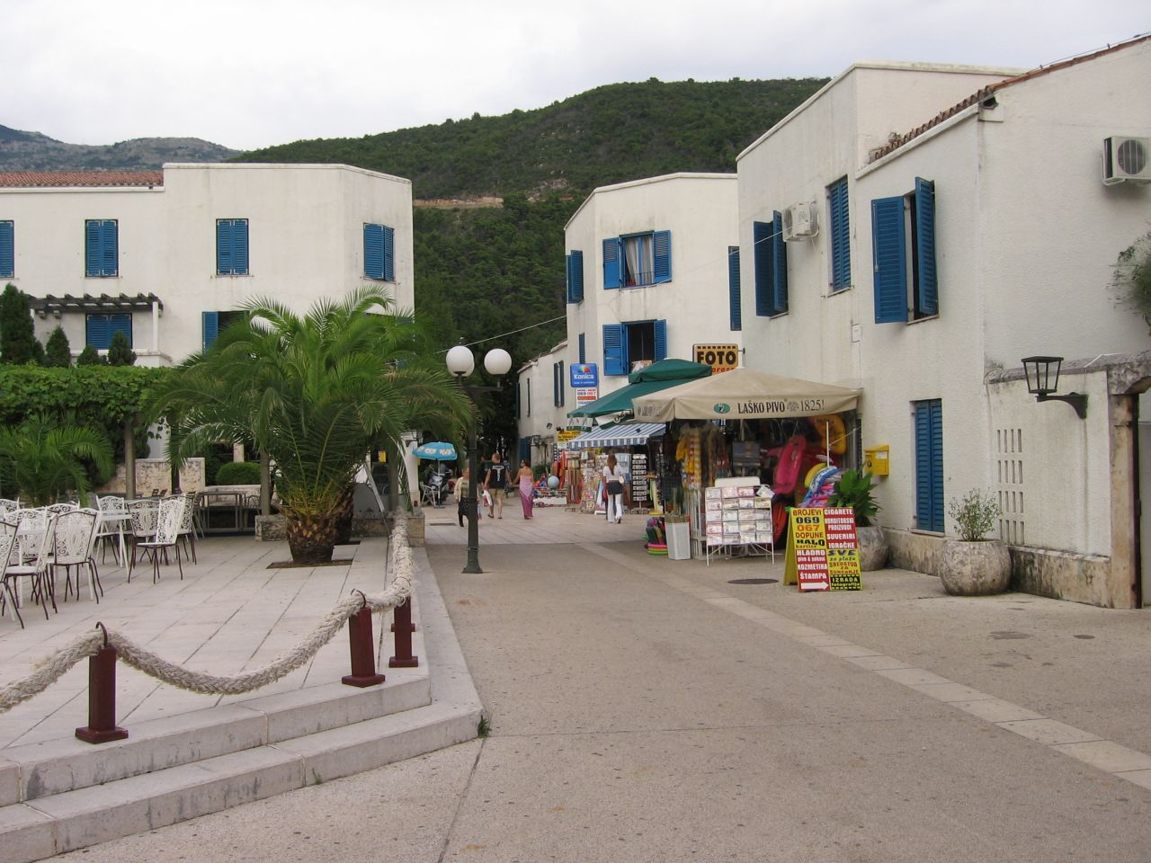 Slovenska plaža in Budva